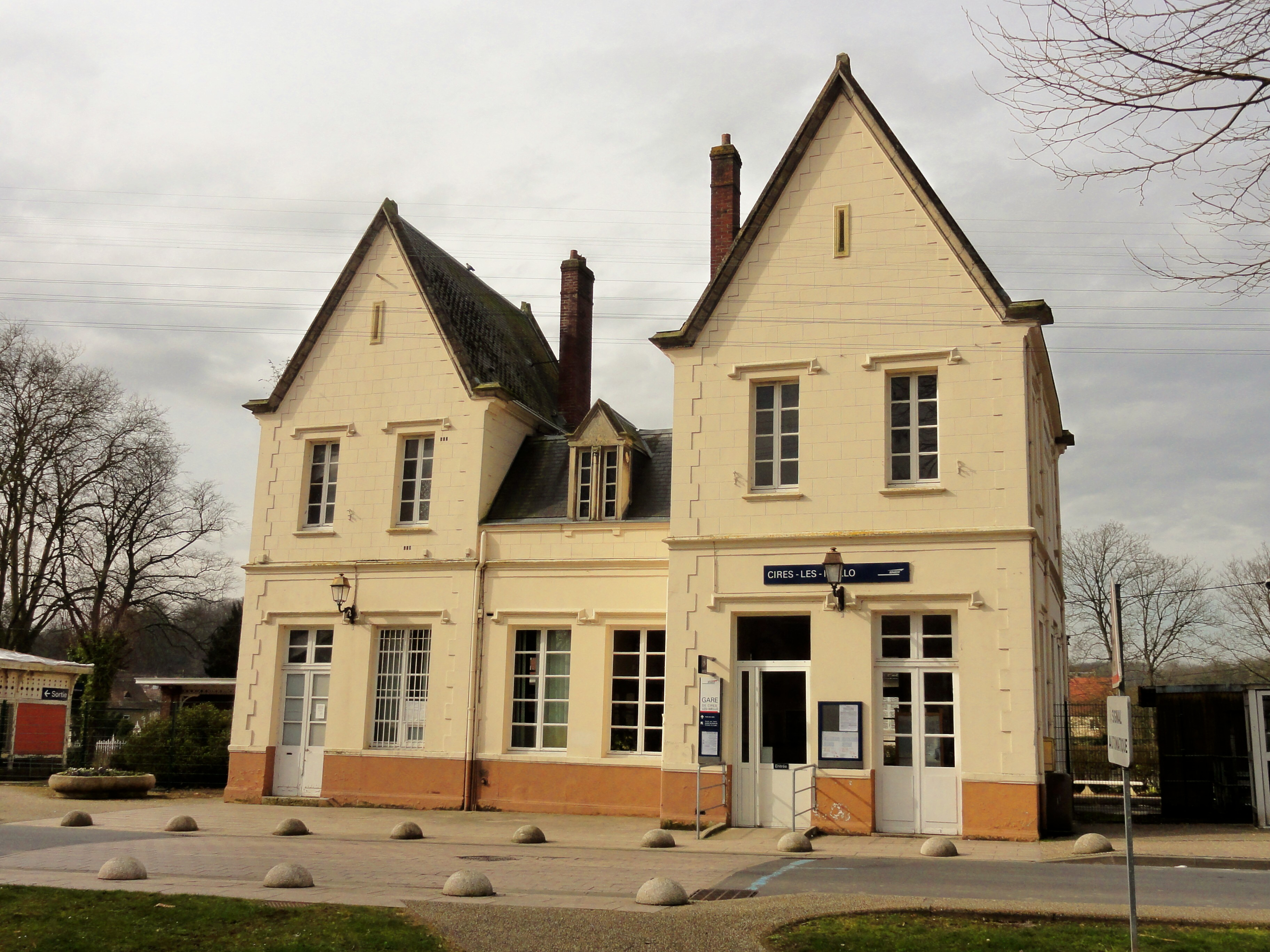 Bâtiment-voyageurs, façade orientale sur la place de la Gare (rue de Verdun).